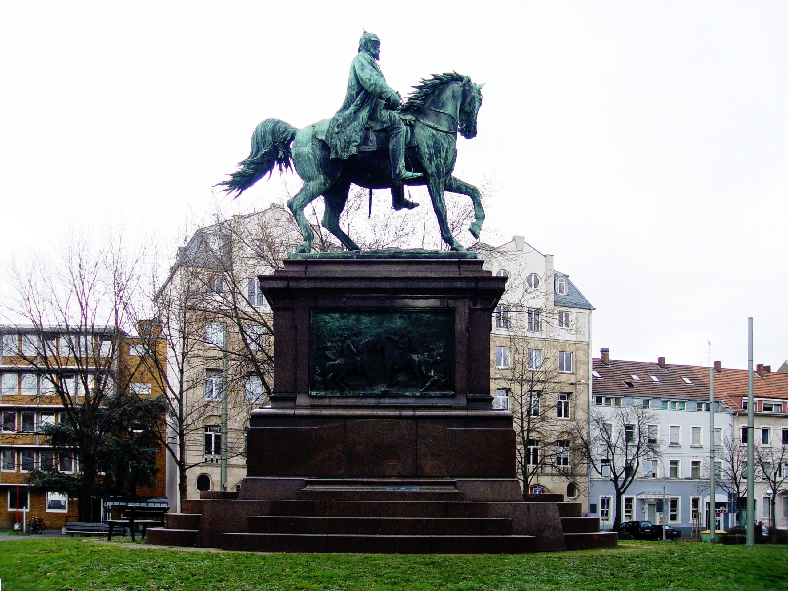 Reiterstandbild für Kaiser Wilhelm I. auf dem Kaiserplatz in Karlsruhe